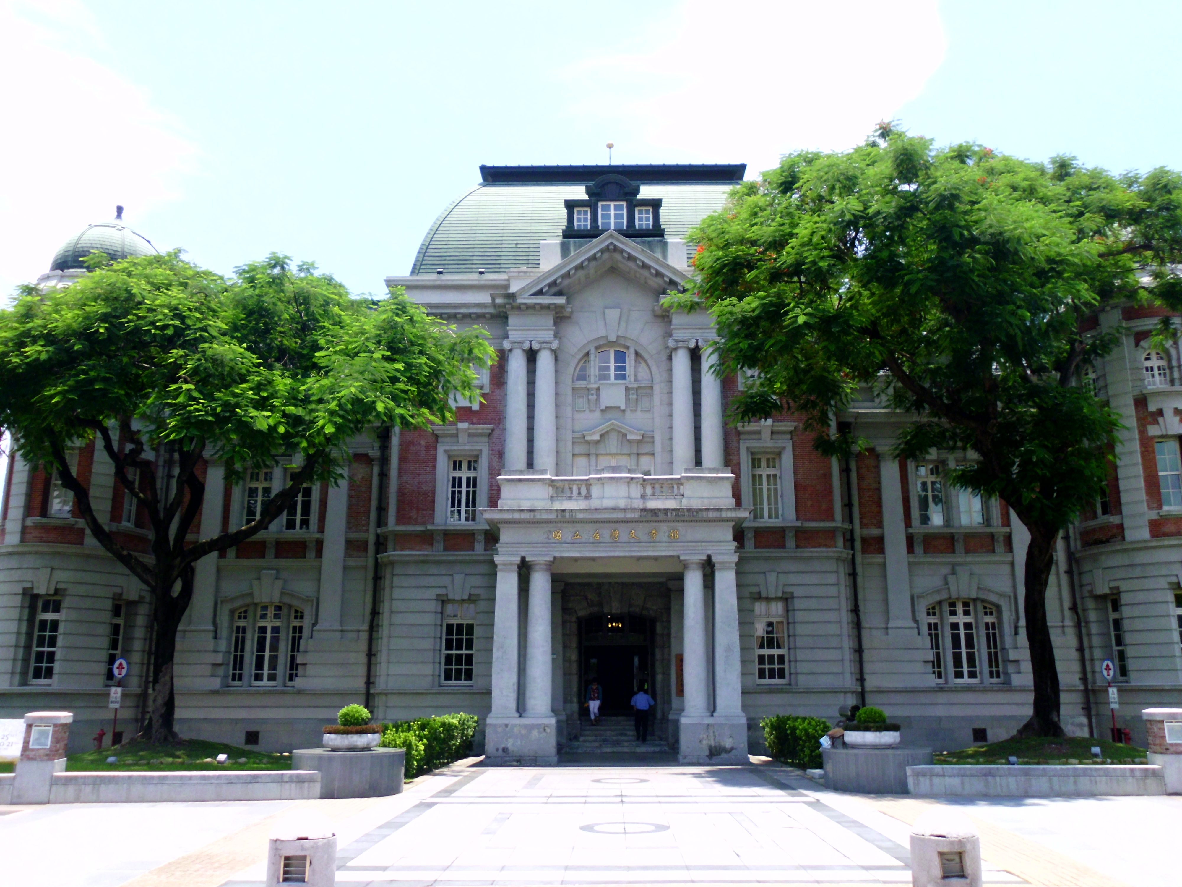 中文（台灣）: 國立台灣文學館。